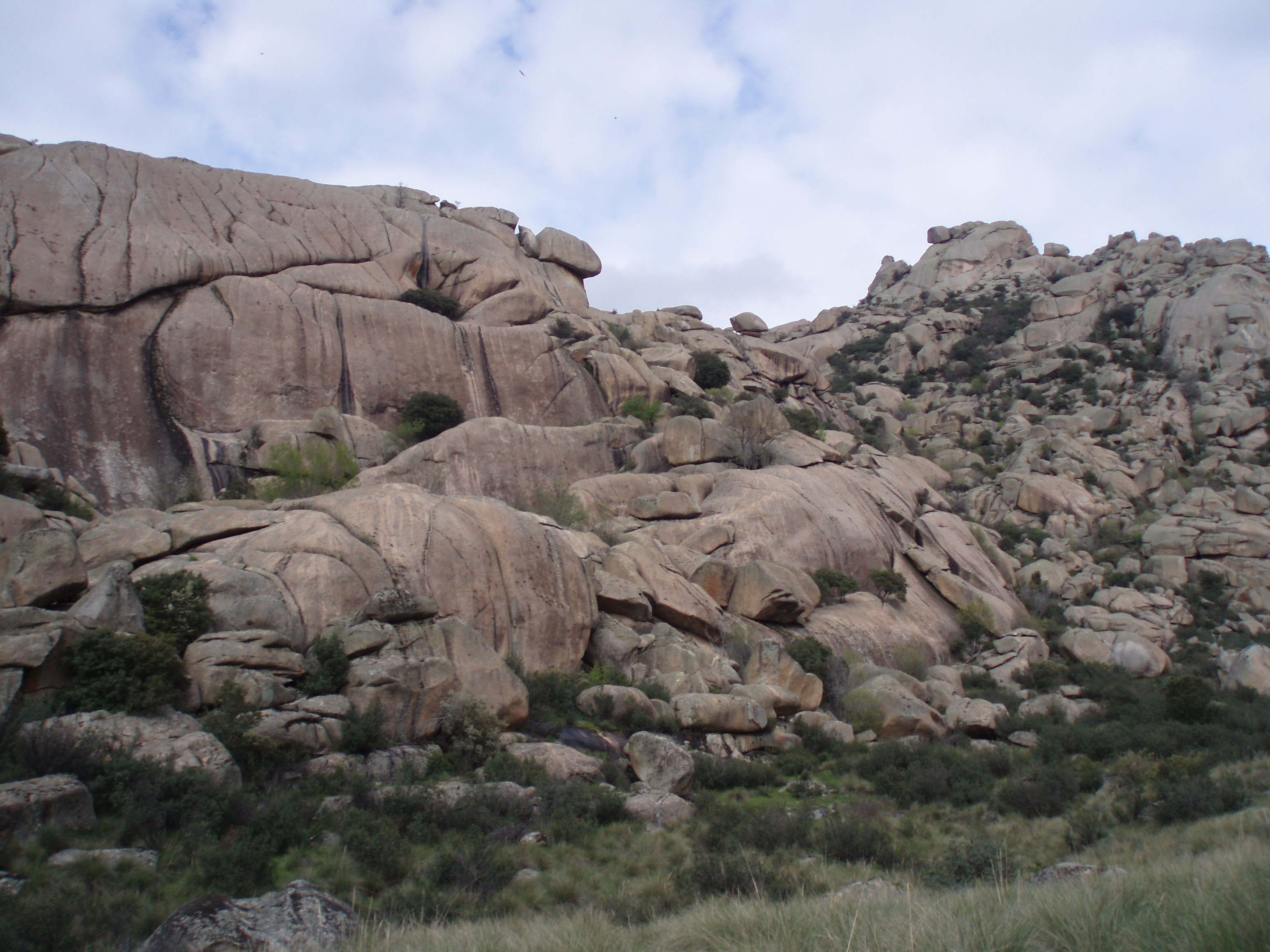 Zona baja del oeste de La Pedriza Anterior (Sierra de Guadarrama, España).